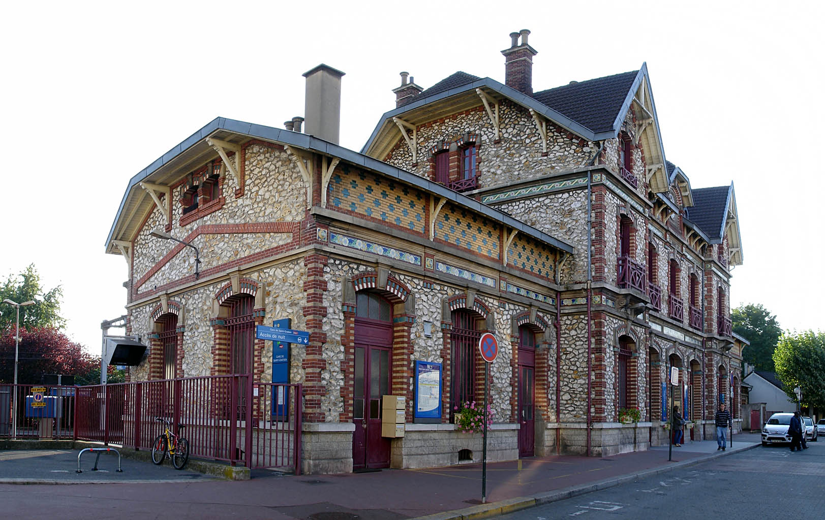 Gare de Saint-Gratien (Val-d'Oise)